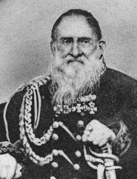 Kommandeur Ulanen-Regiment "Großherzog Friedrich von Baden" (Rheinisches) Nr. 7